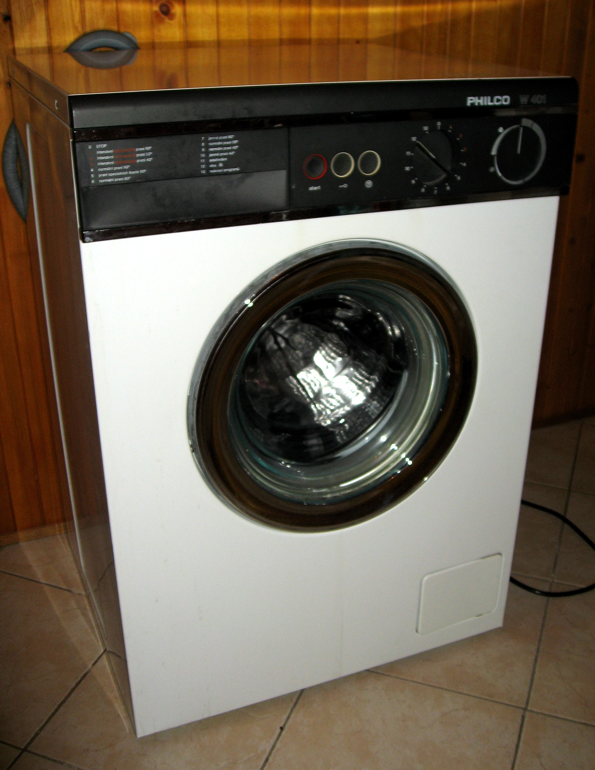 Philco W401